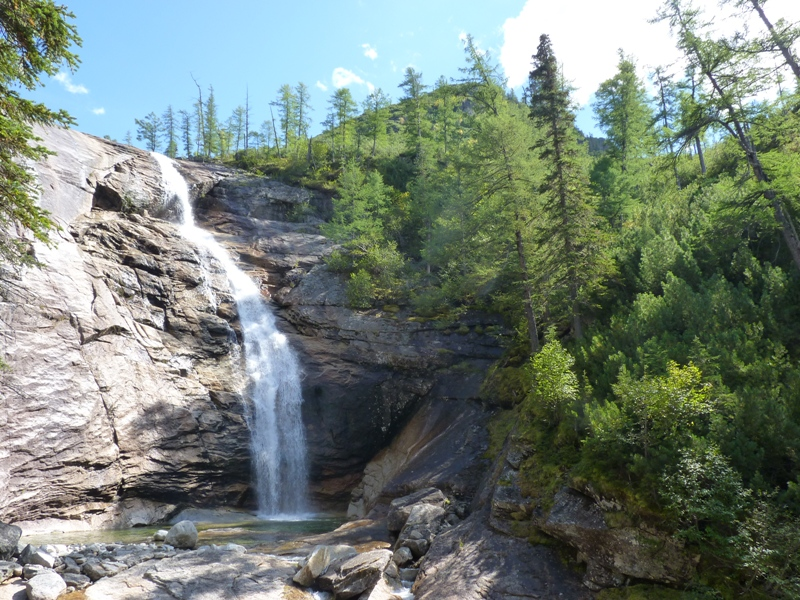 Водопад Медвежий (Неожиданный)